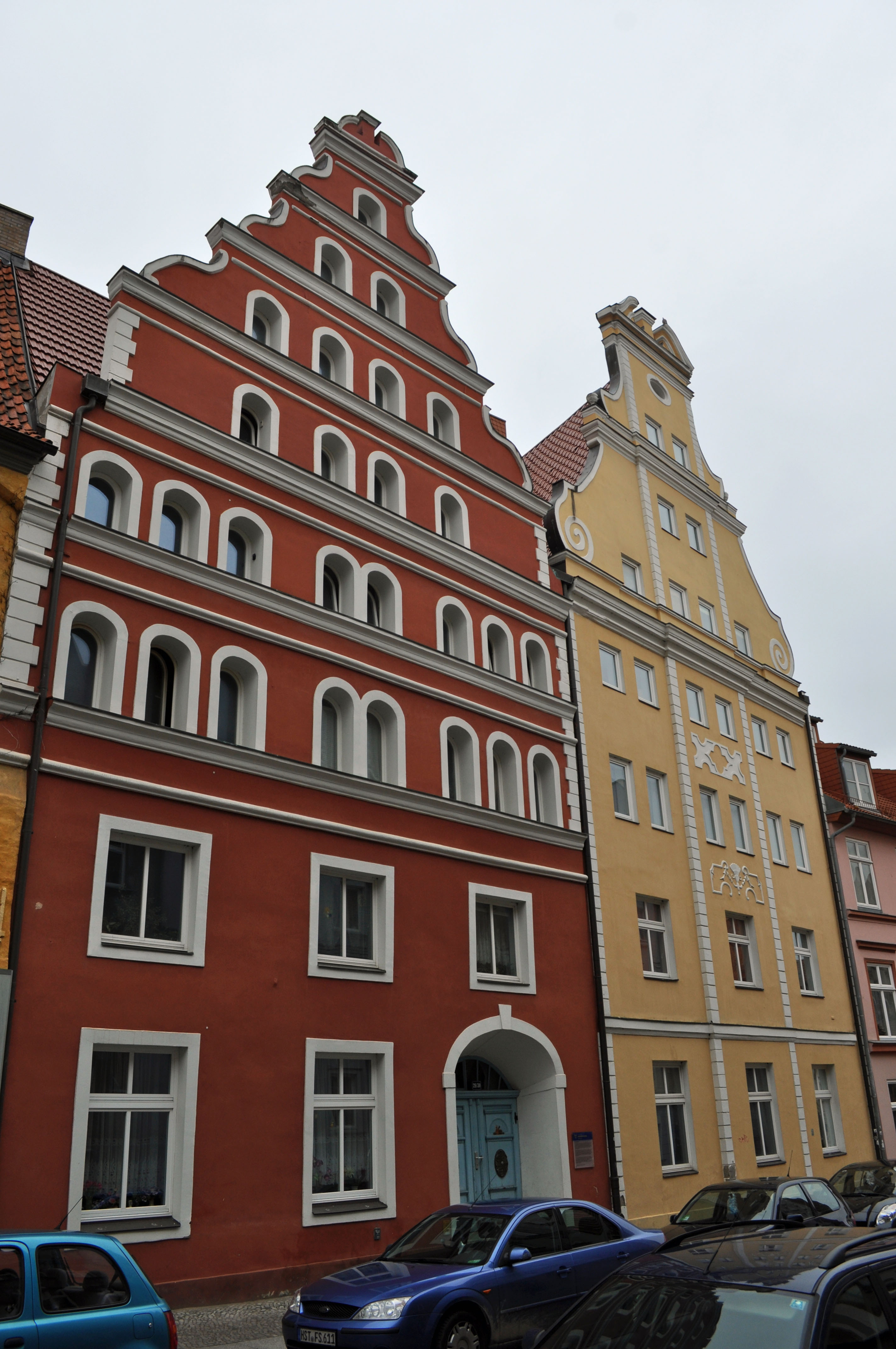 Gebäude bzw. Gebäudedetail in Stralsund. Straße und Hausnummer siehe Dateiname.